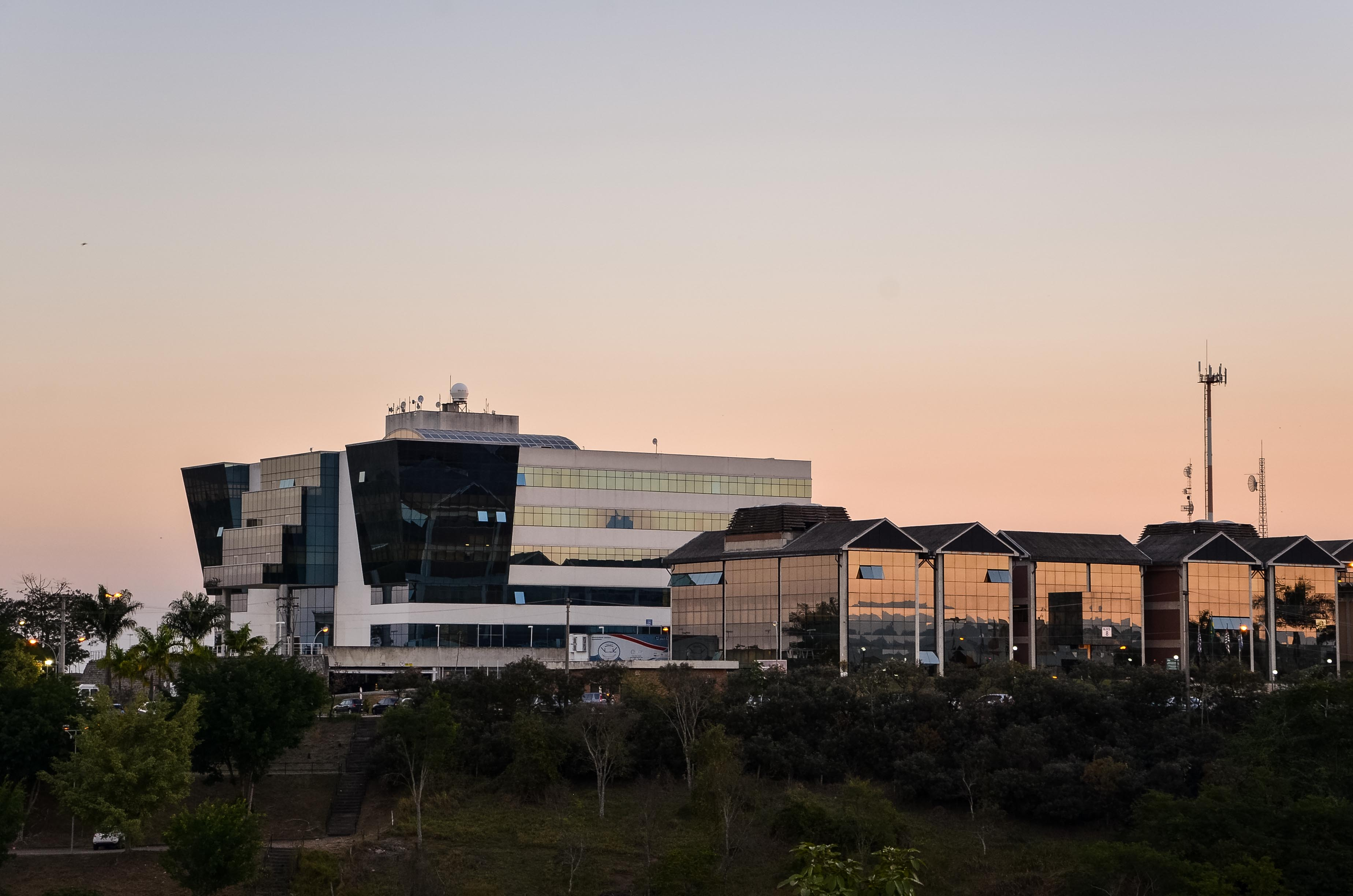 Parque Tecnológico Univap da Fundação Valeparaibana de Ensino (FVE) / Universidade do Vale do Paraíba (Univap), localizada em São José dos Campos/SP.